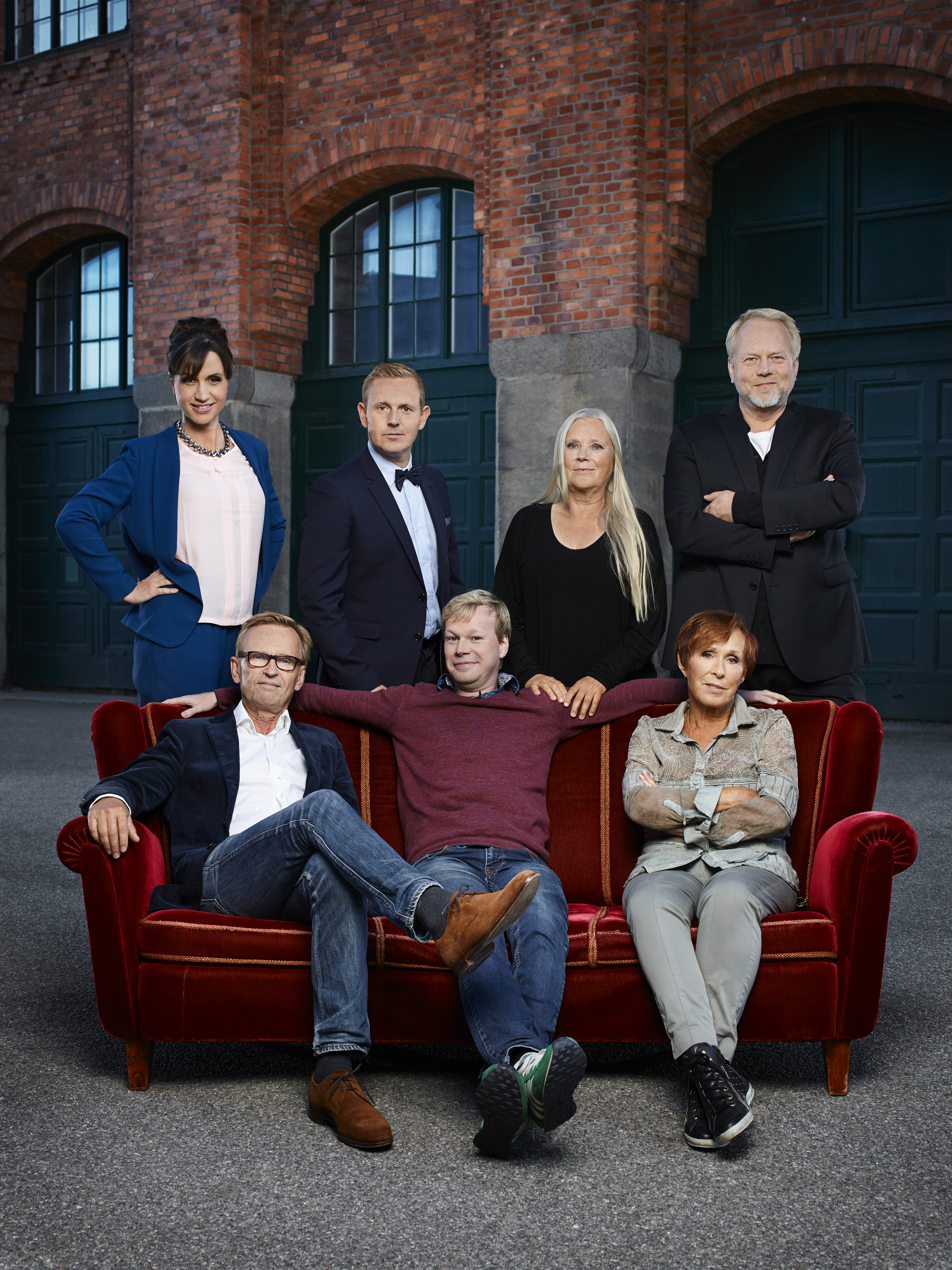 Deltagarna i En clown till kaffet, en serie om komiker på Kanal 5. Nedre rad frv: Johan Ulvesson, Johan Glans och Eva Rydberg. Övre rad frv: Petra Mede, Måns Möller, Ulla Skoog och Peter Apelgren.